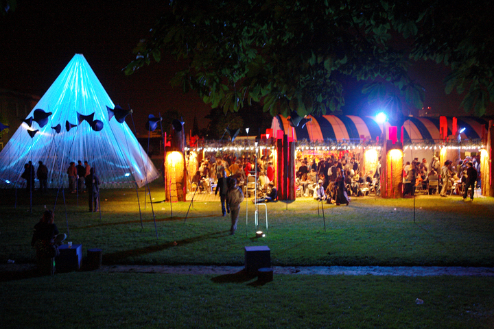 Le bar des Tombées de la Nuit installé dans le parc du Thabor à Rennes.